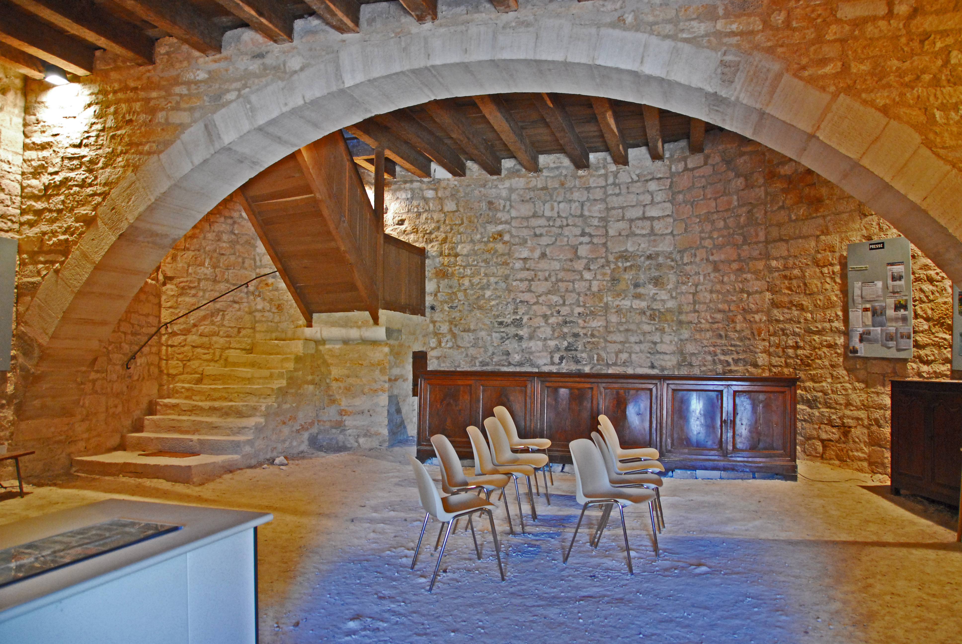 Chateau de Simiane-la-Rotonde, Erdgeschoss der Rotunde